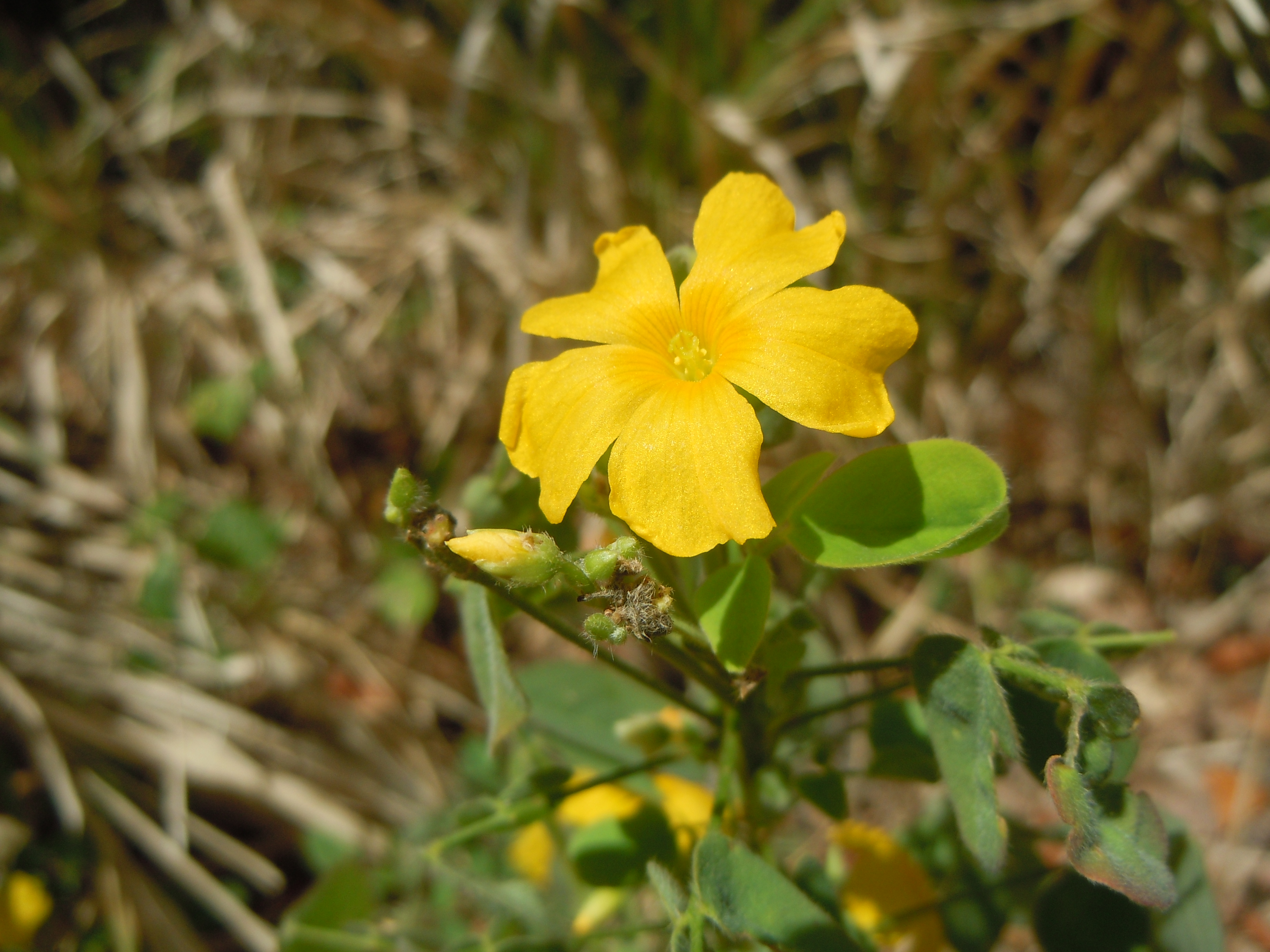 Vue de la planteOxalis frutescens - Anse Noire, Martinique